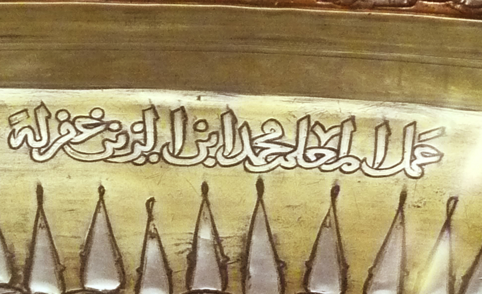 Category:Artworks with known accession number|LP26 ArtistMohammed ibn al-ZaynTitleBaptistère de saint LouisDatebetween circa 1320 and circa 1340Mediumhammered brass; engraved decoration, gold, silver and nielloDimensionsHeight: 22.2 cm (8.7 in). Diameter: 50.2 cm (19.8 in).Current location (Inventory)Louvre Museum Native nameMusée du LouvreLocationParisCoordinates48° 51′ 37″ N, 2° 20′ 15″ E Established1793Website control VIAF: 130051079 ISNI: 0000 0001 2260 177X ULAN: 500125189 LCCN: n80020283 NLA: 35912436 WorldCat This work is part of the collections of the Louvre (Department of Islamic Art).Accession numberLP 26 Object historyProvenance: Syria or EgyptReferencesMusée du Louvre, Atlas database: entry 21176Source/PhotographerSelf-photographed